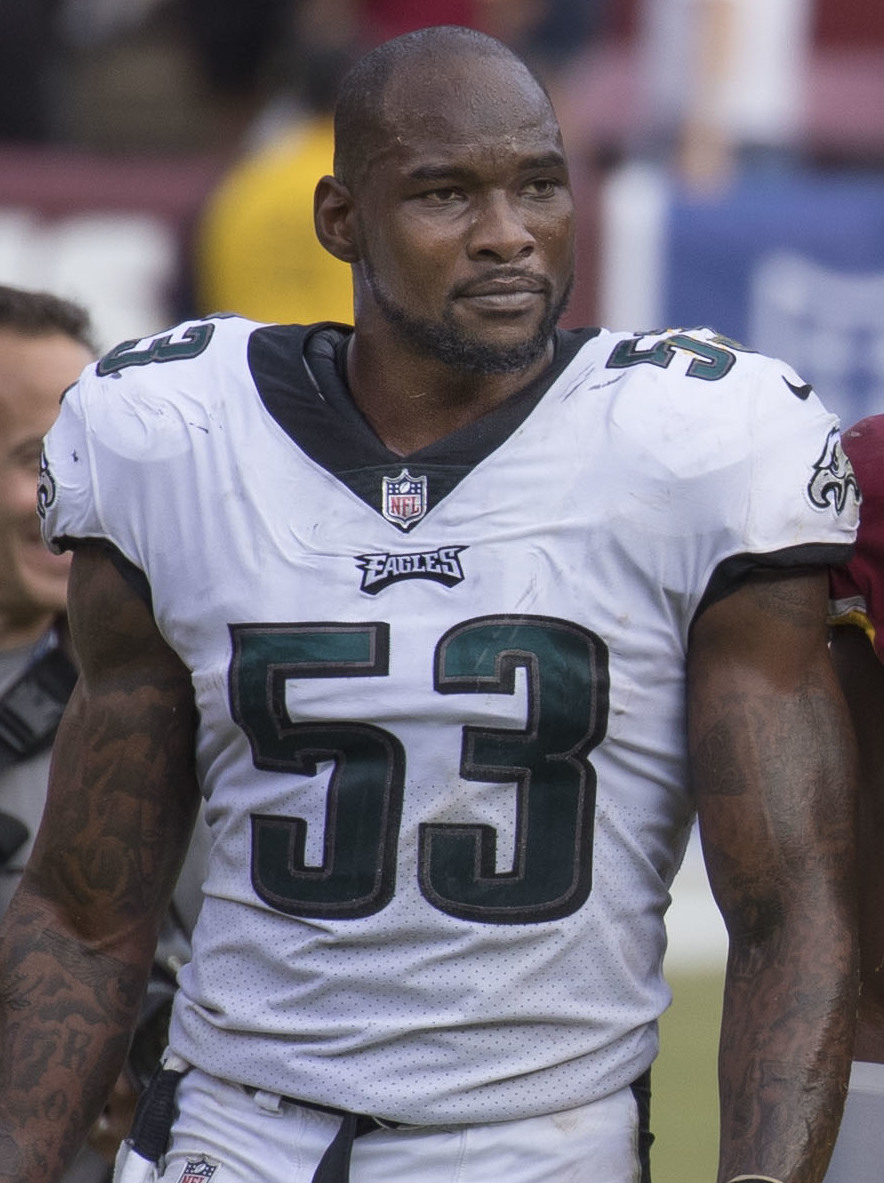 Eagles at Redskins 9/10/17